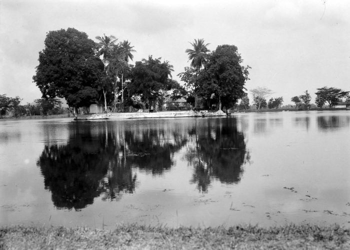 Negatief. Het huis voor afgedankte sultansvrouwen op een eiland in het kunstmatig aangelegde waterreservoir Tasik Ardi, te Bantam